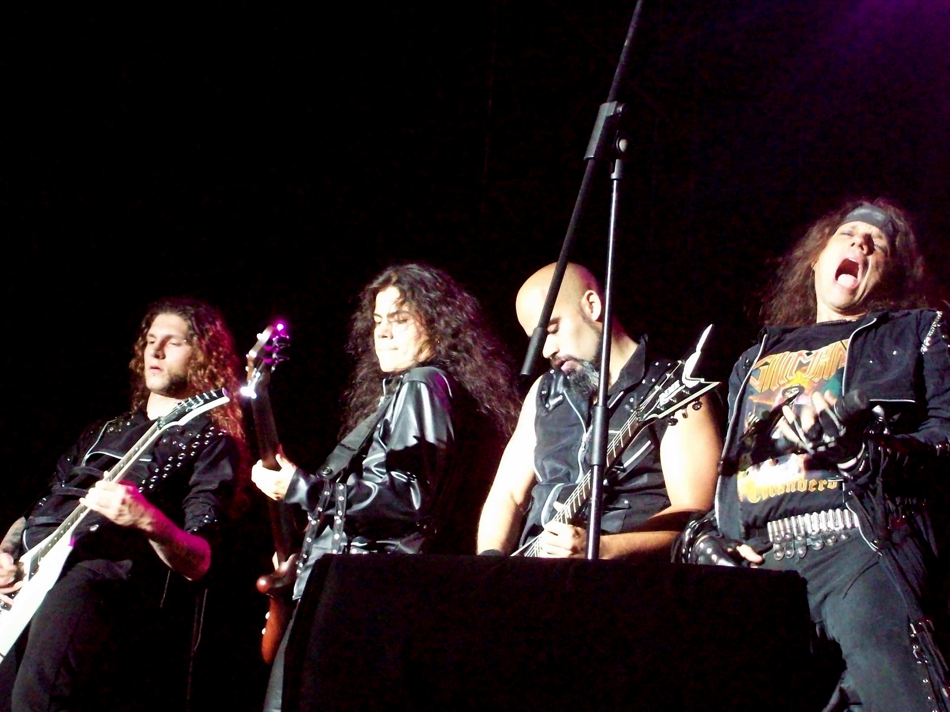 Barquisimetal 2011 Estado Lara Venezuela